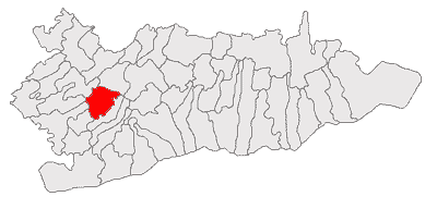 Categorie:Hărţi ale judeţului Călăraşi